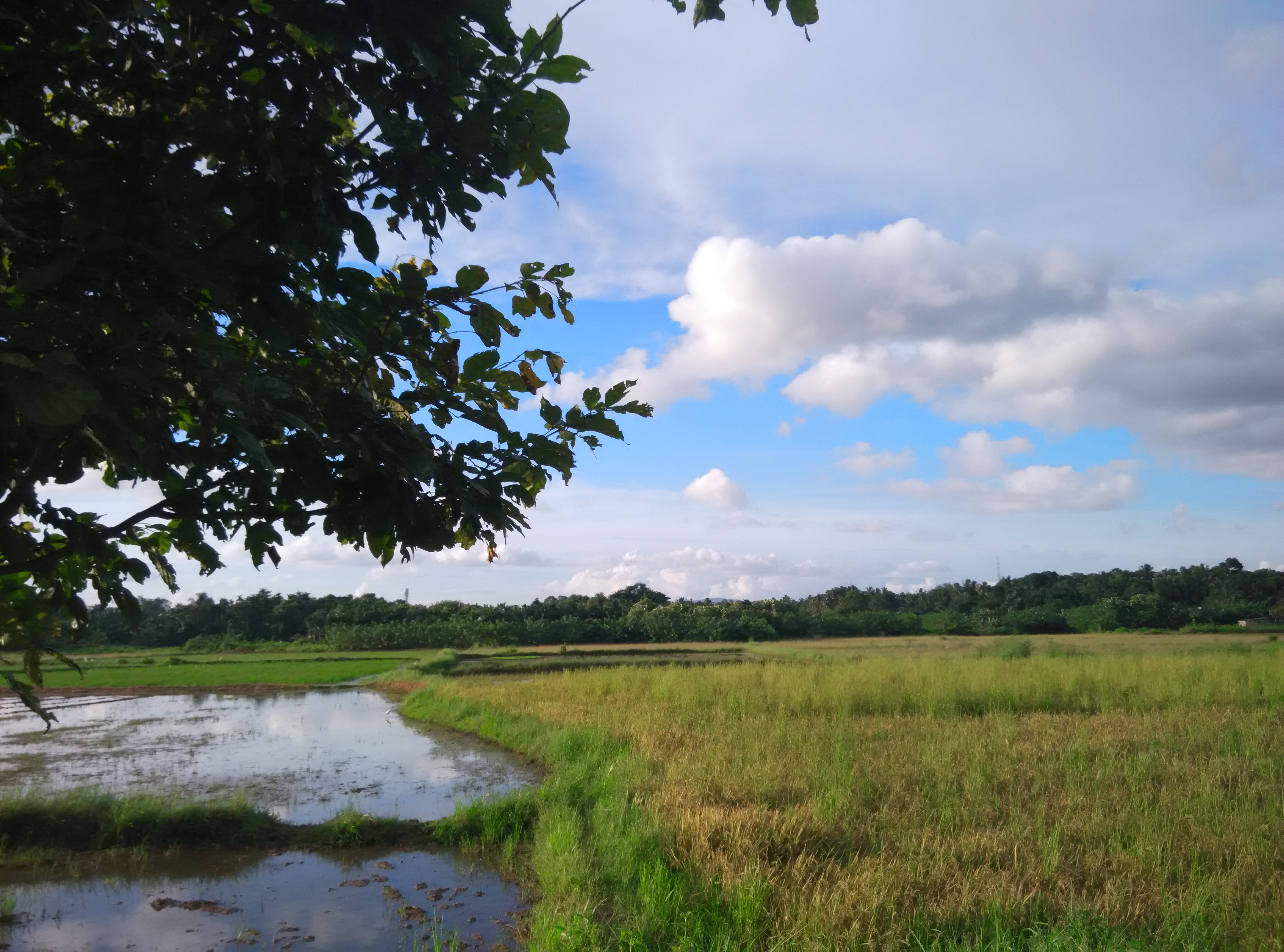 chelakkara kurmala